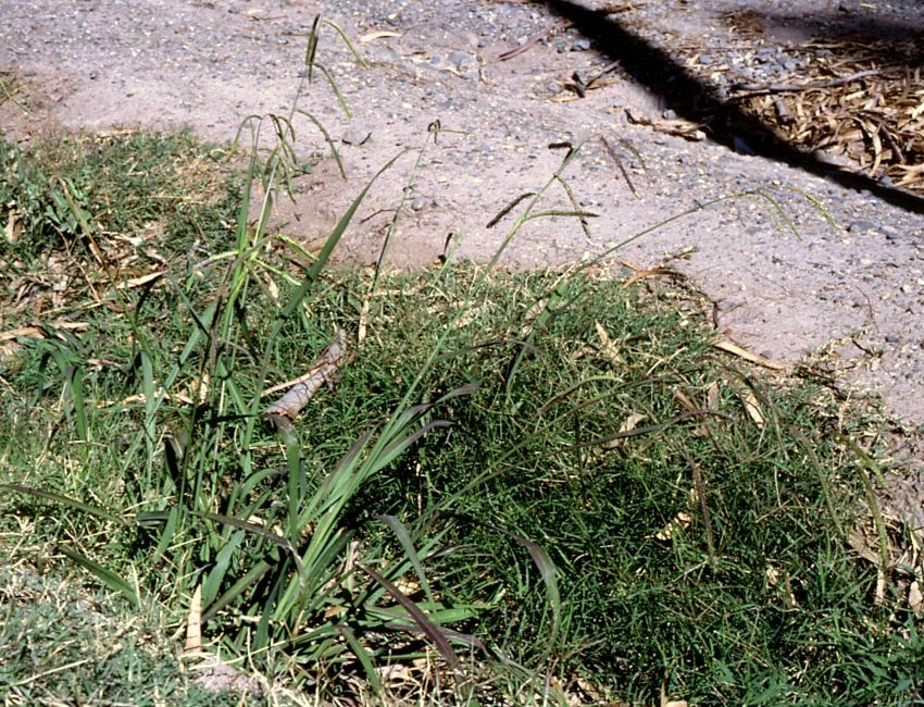 Paspalum dilatatum, Süßgräser (Poaceae) - Argentinien/Argentina, Mendoza, Parque General San Martín (Prov. Mendoza)